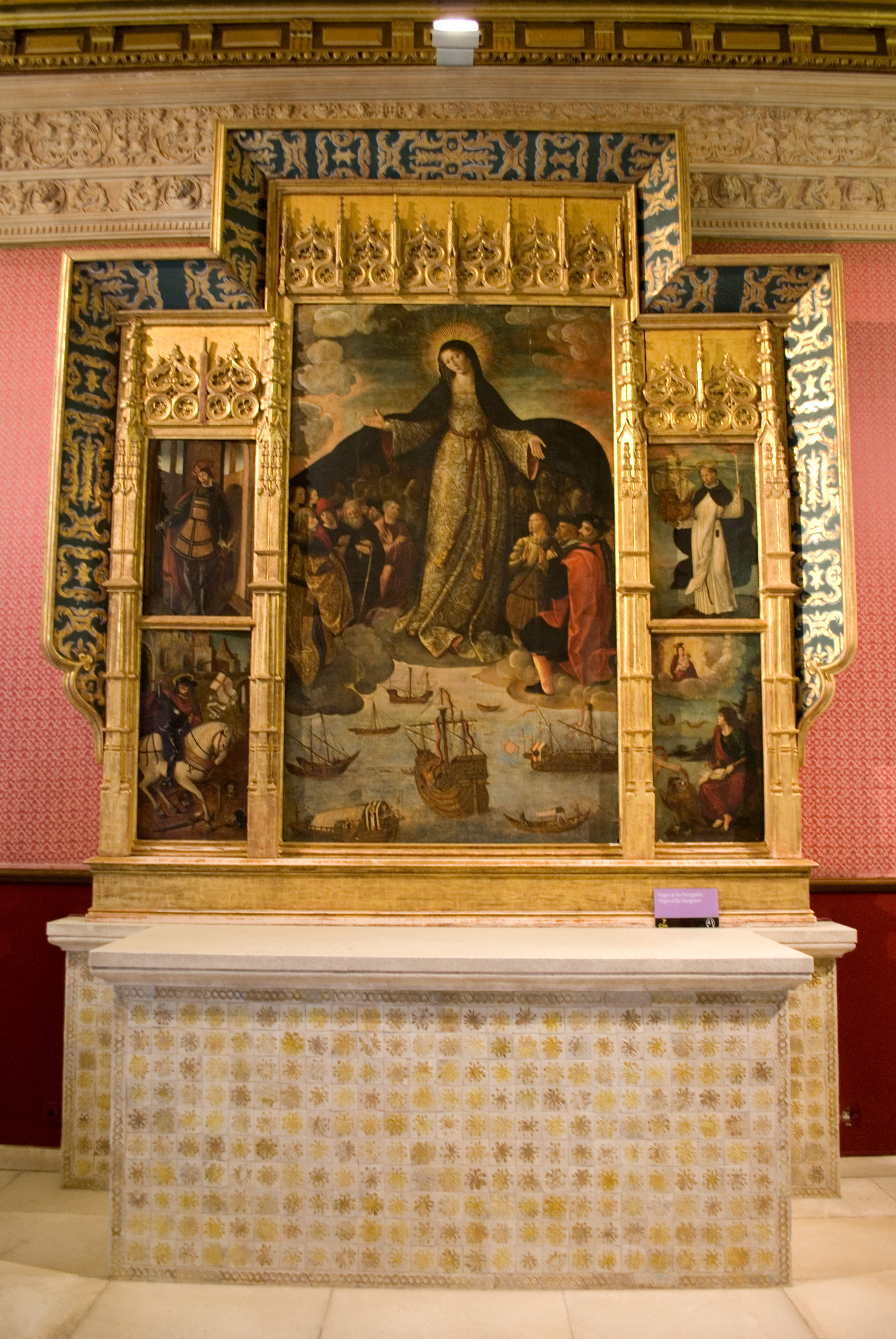 Retablo de la Virgen de los Mareantes, (Cuarto del almirante), Alcázar de Sevilla. Autor: Alejo Fernández